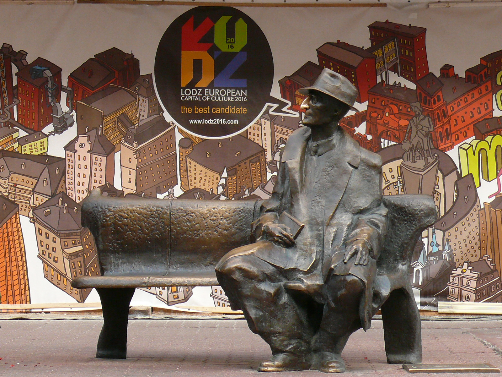 Ławeczka Tuwima na tle bannera reklamującego Łódź jako Europejską Stolicę Kultury w 2016 roku. - efekt inicjatywy Grupy Pewnych Osób